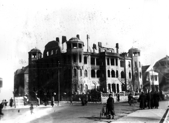 青岛国民党市党部被焚毁